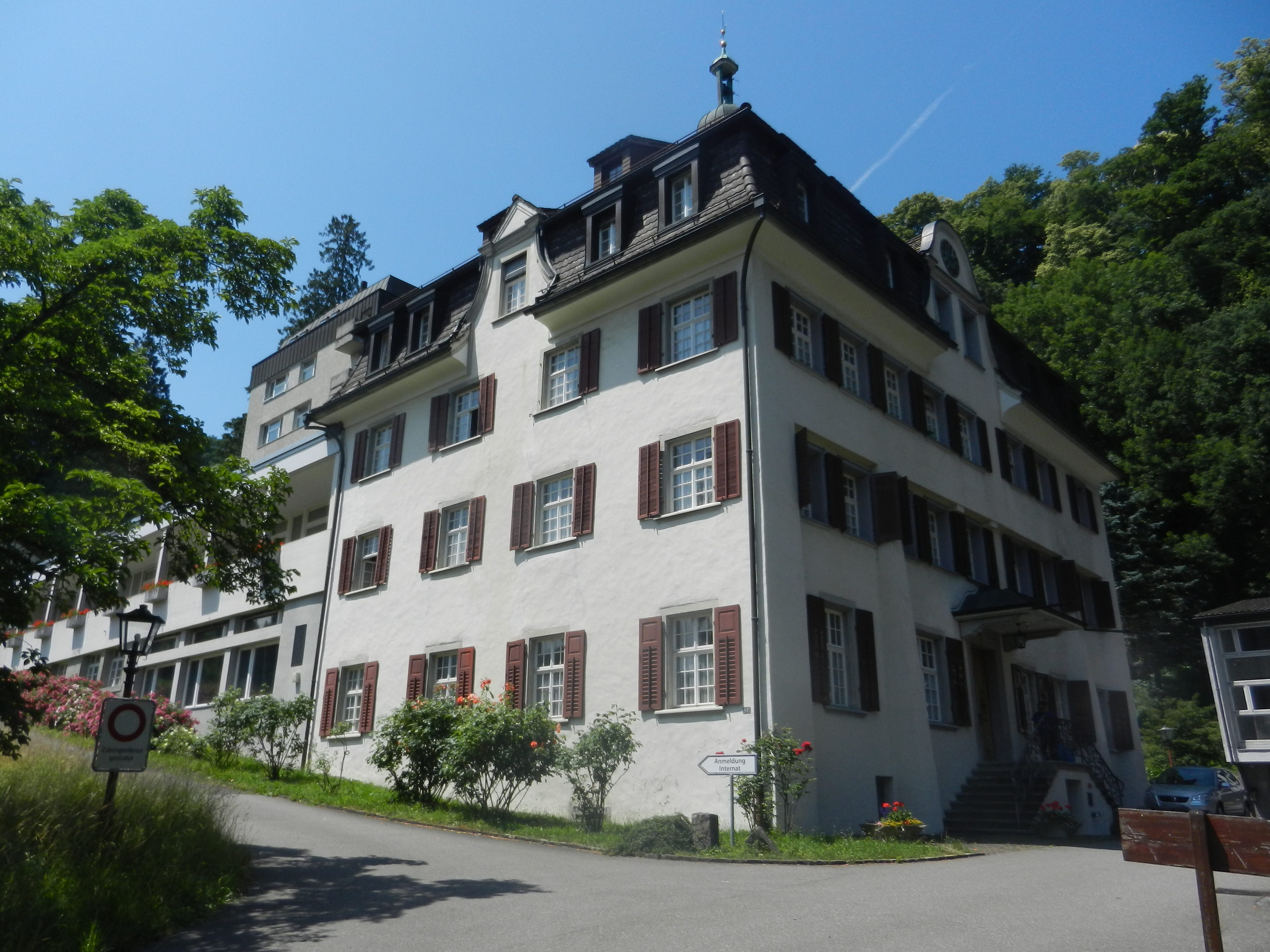 Marienburg (ehemalige Weinburg) in Thal, St. Gallen. KGS-Nr.: 14082 Während langer Zeit beherbergte die Marienburg ein Gymnasium. In den Jahren um 2018 sind dort unbegleitete jugendliche Asylbewerber untergebracht.